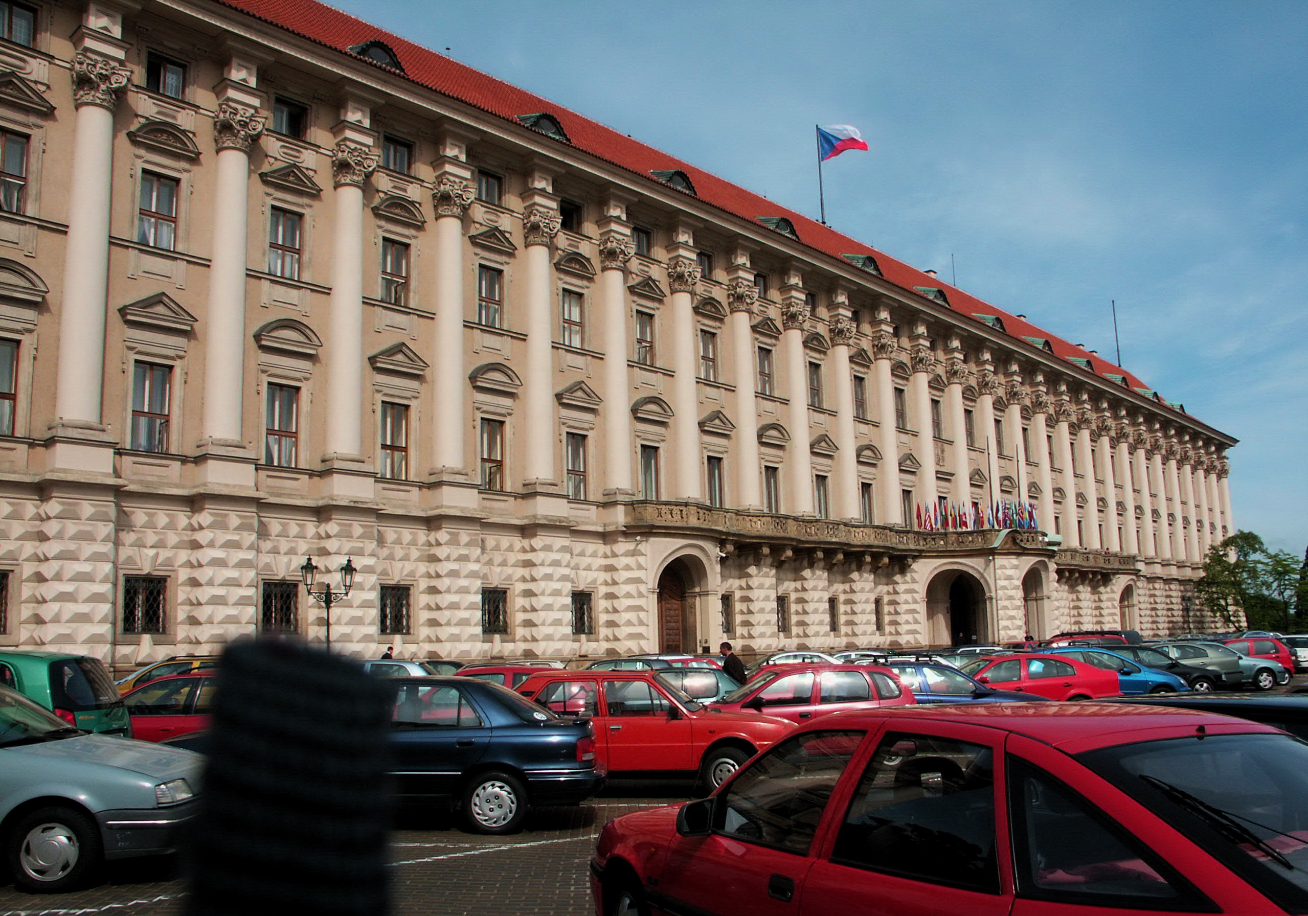 Cerninsky Palac 切寧宮